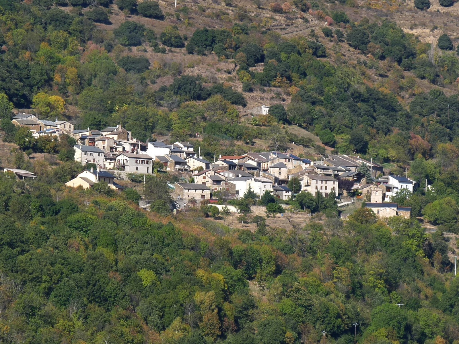 Oreilla vu de la route de Souanyas, Pyrénées-Orientales, France